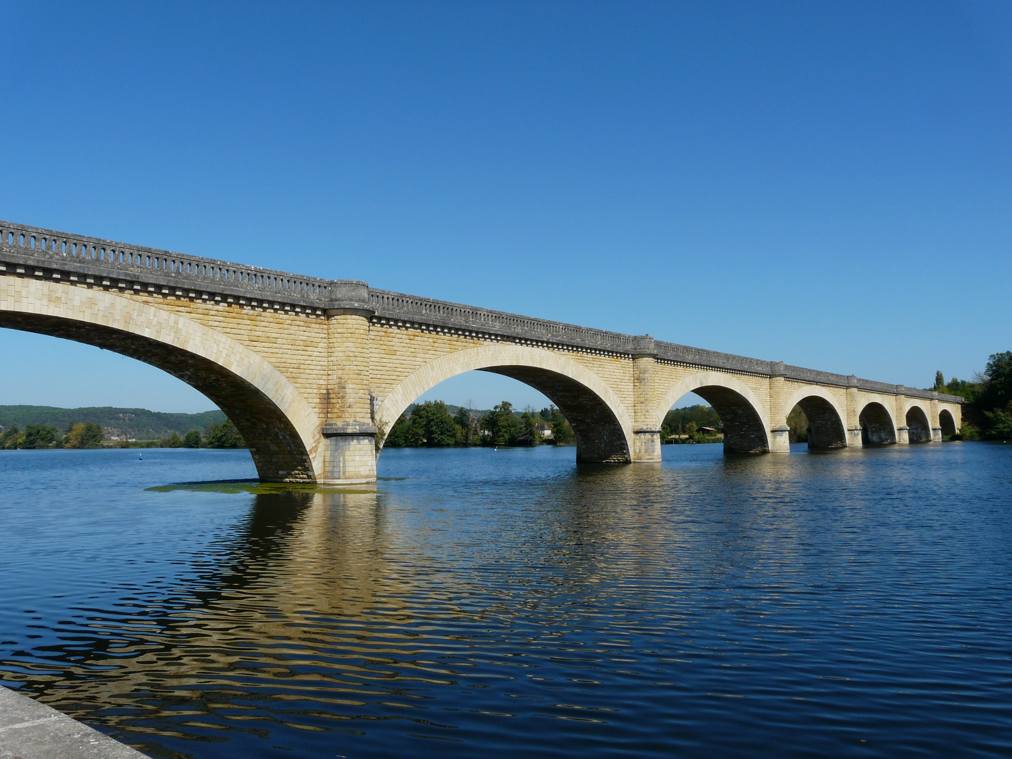 Le pont de Mauzac au-dessus de la retenue du barrage de Mauzac, entre Mauzac-et-Grand-Castang à gauche et Calès à droite, Dordogne, France.